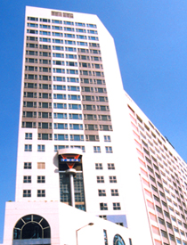 在此向你們上載及授權你們使用相片HK_YMCA_KowloonCentre.jpg,此相片為香港中華基教青年會總會標誌,也為地區地標. 此相片將會放置維基網站: 以更換舊相片: HK_YMCA_KowloonCentre_Logo.jpg